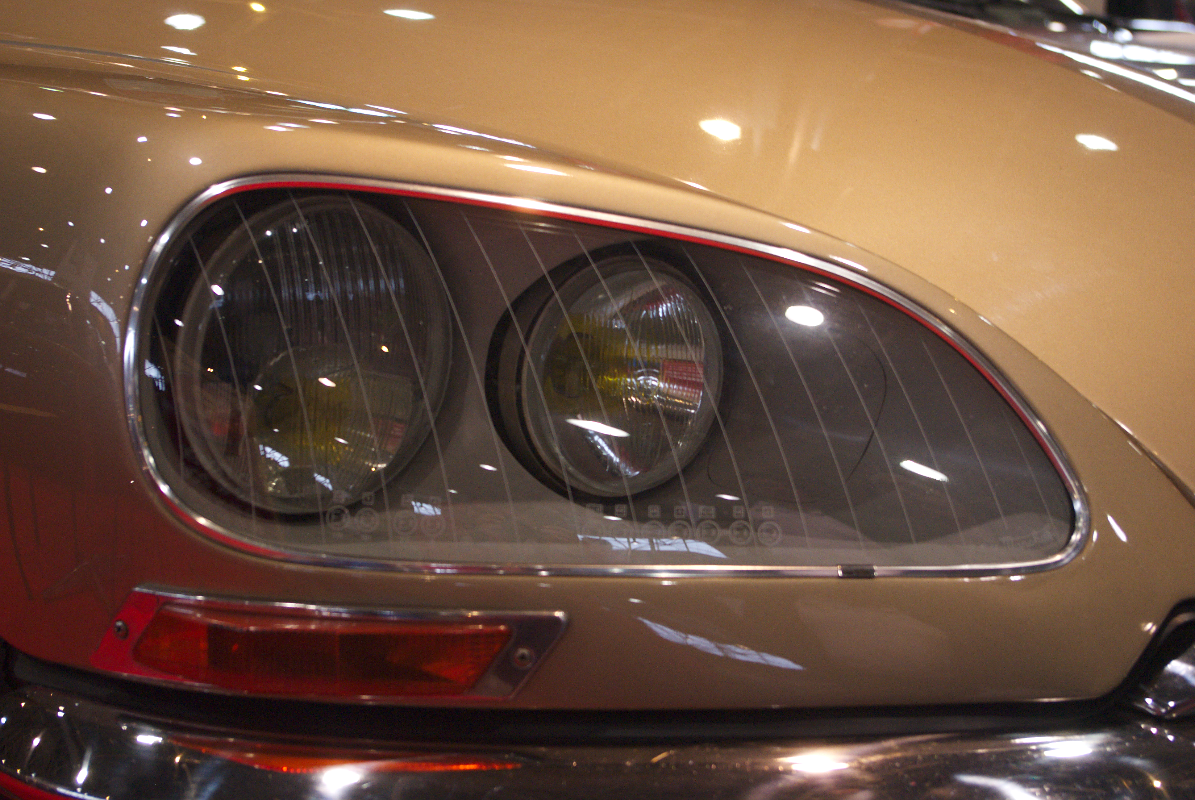 Phare de DS à Epoqu'auto 2012